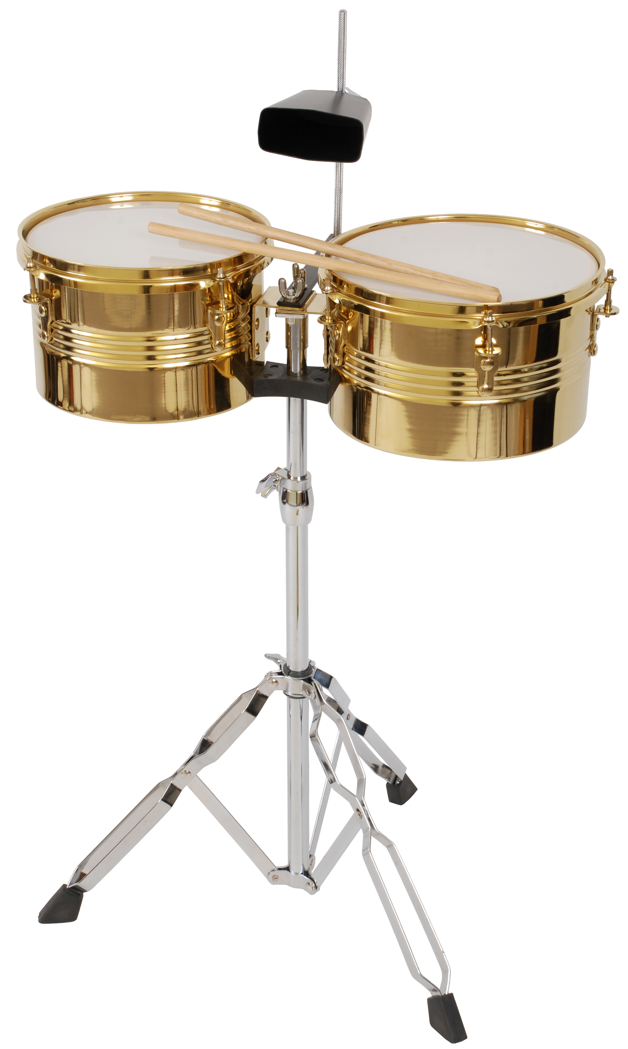 Timbalesy HLTBR-1011 firmy Hayman